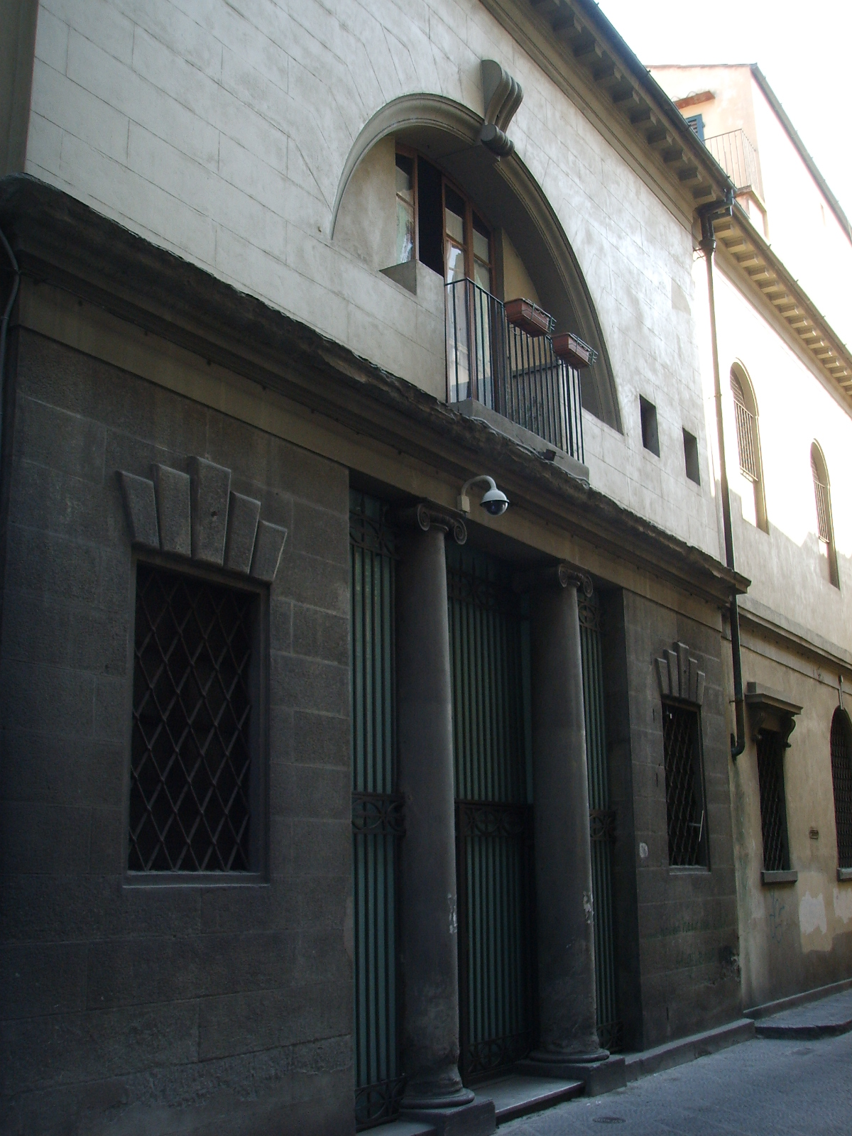 Ex_entrata_santa_maria_a_candeli,_borgo_pinti in Florence